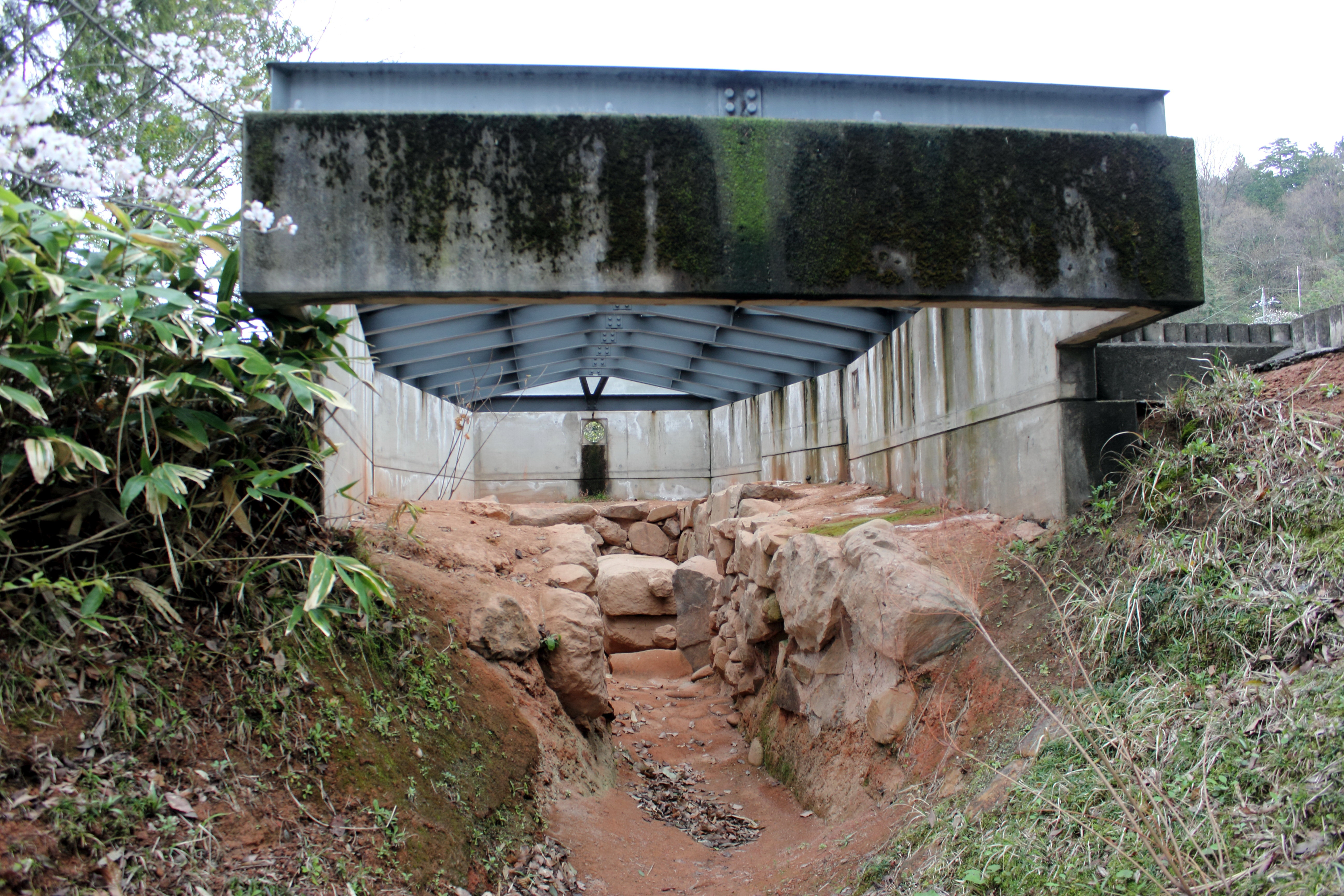 春日山古墳（永平寺町） 石室を外側から